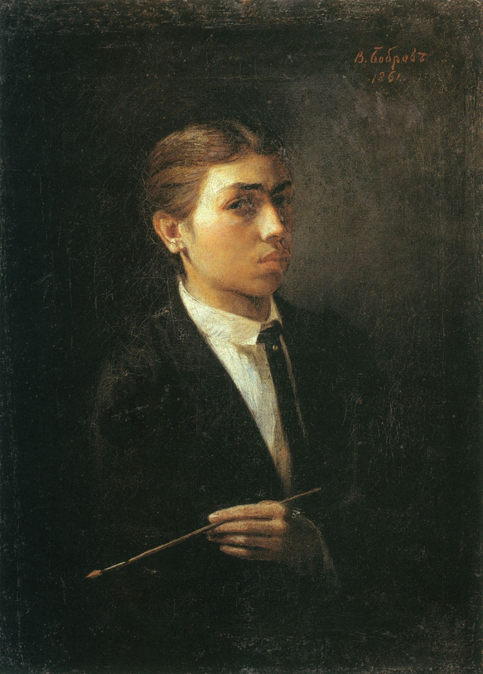 Виктор Алексеевич Бобров (1842—1918) — русский акварелист и академик живописи - автопортрет (1861).